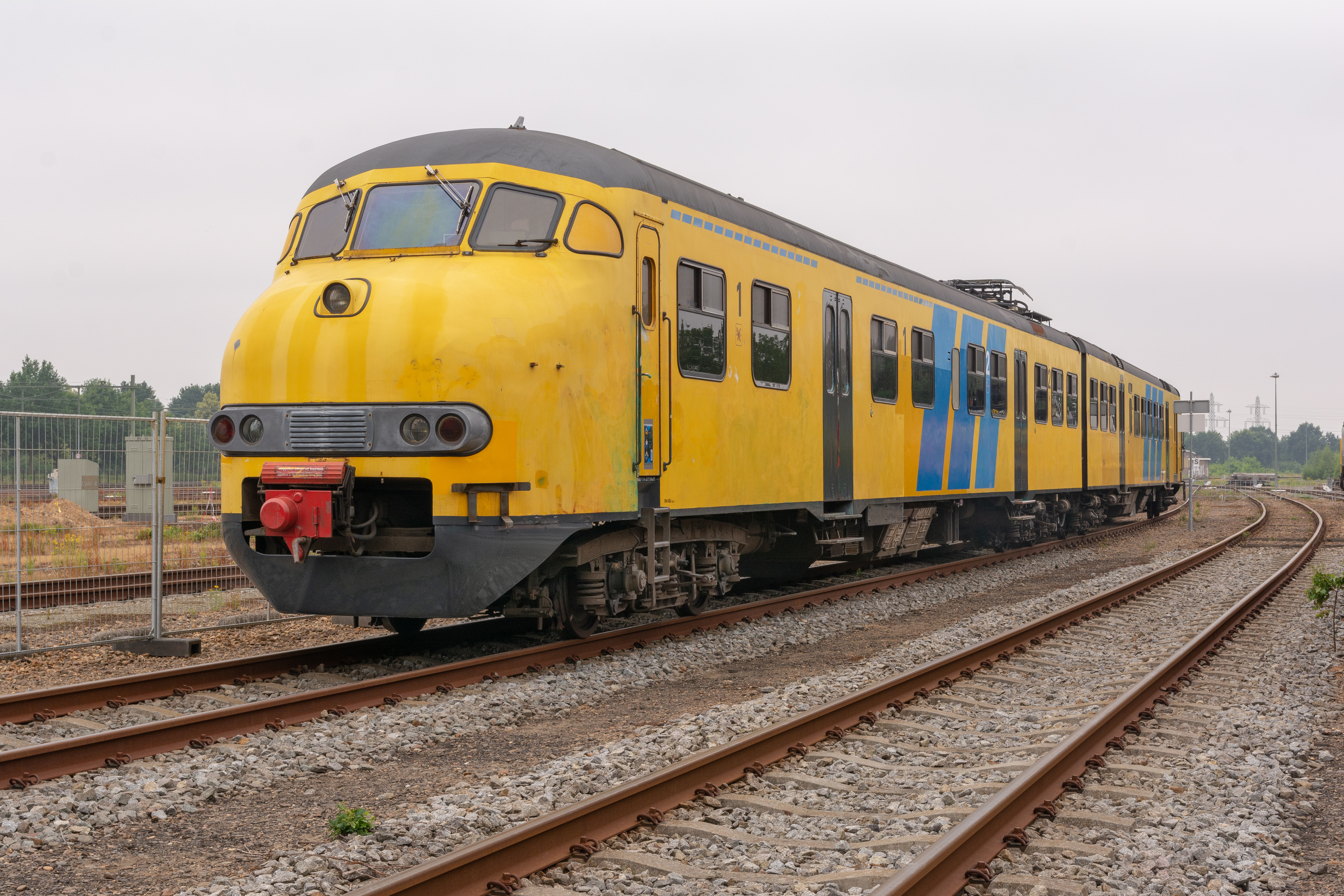 In het weekend van 9 en 10 juni 2018 werd bij de oude werkplaats in Blerick, het Multi Event gehouden. Naast veel modelspoor, werd er bij het naastliggende Stadler terrein groot spoor materieel tentoongesteld. Sinds 20 augustus 2011 is de 904 in het bezit van de Stichting Mat'64. Het treinstel werd in 1973 door Talbot afgeleverd aan de Nederlandse Spoorwegen en komt uit de serie V10.